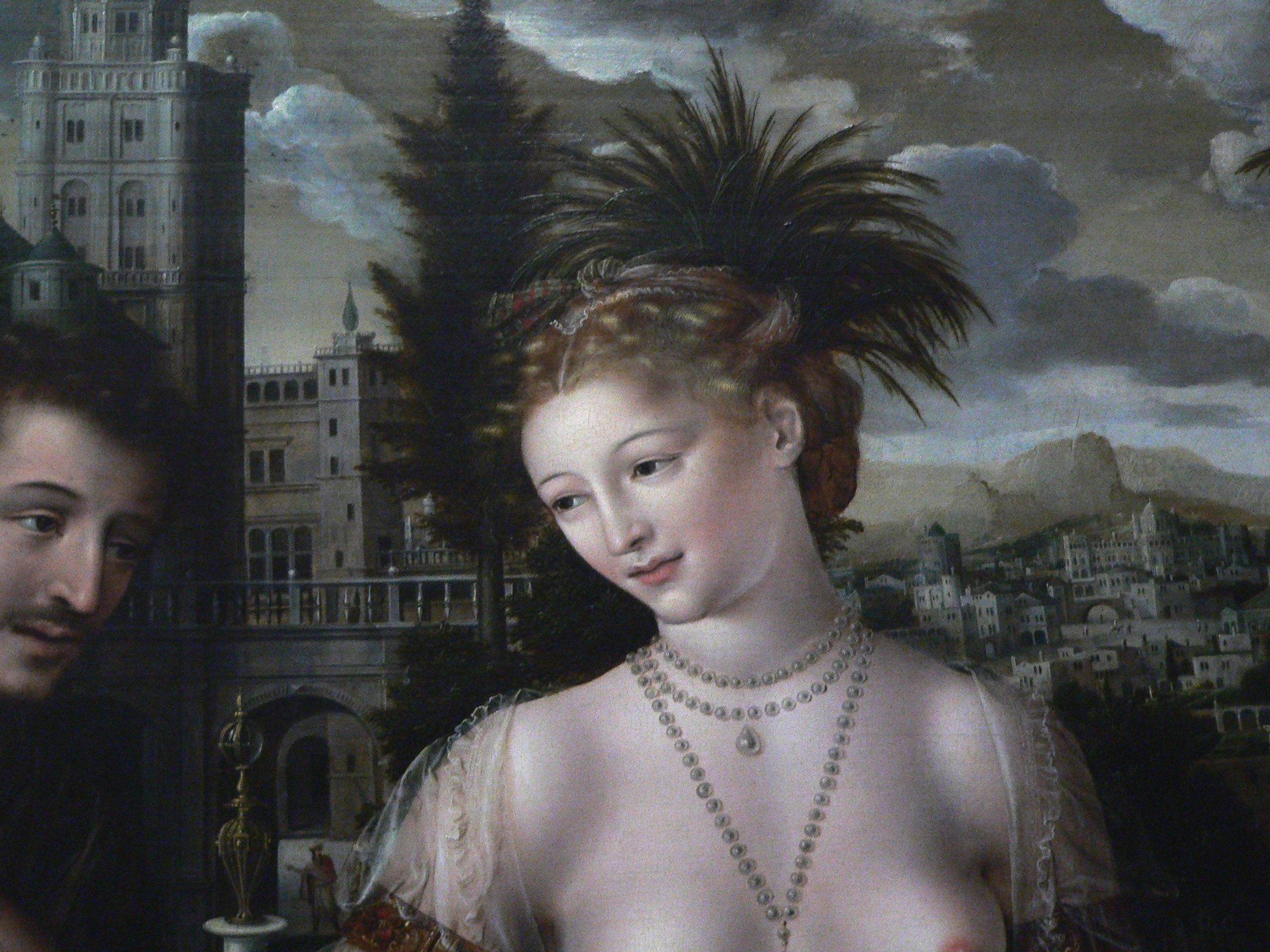 detail